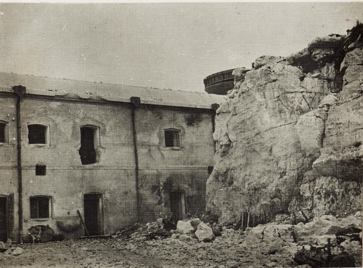 Campolongo Kehlgebäude.